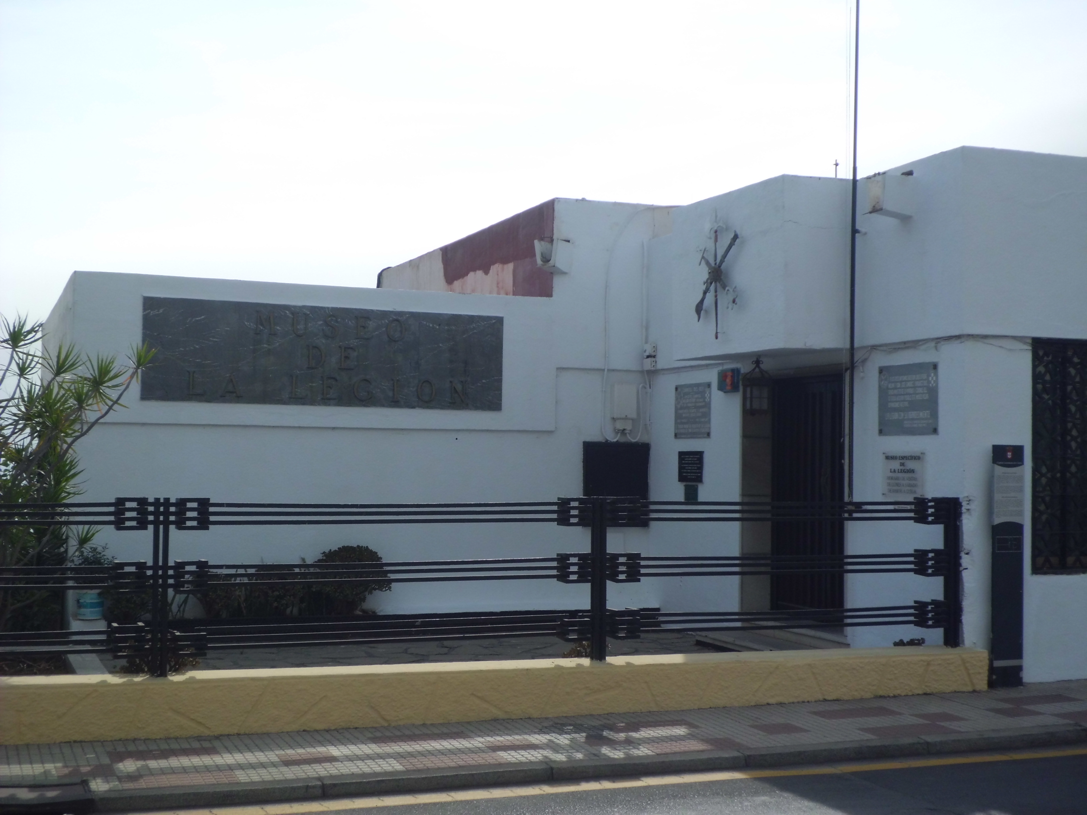 Museo de la Legión, Ceuta, España